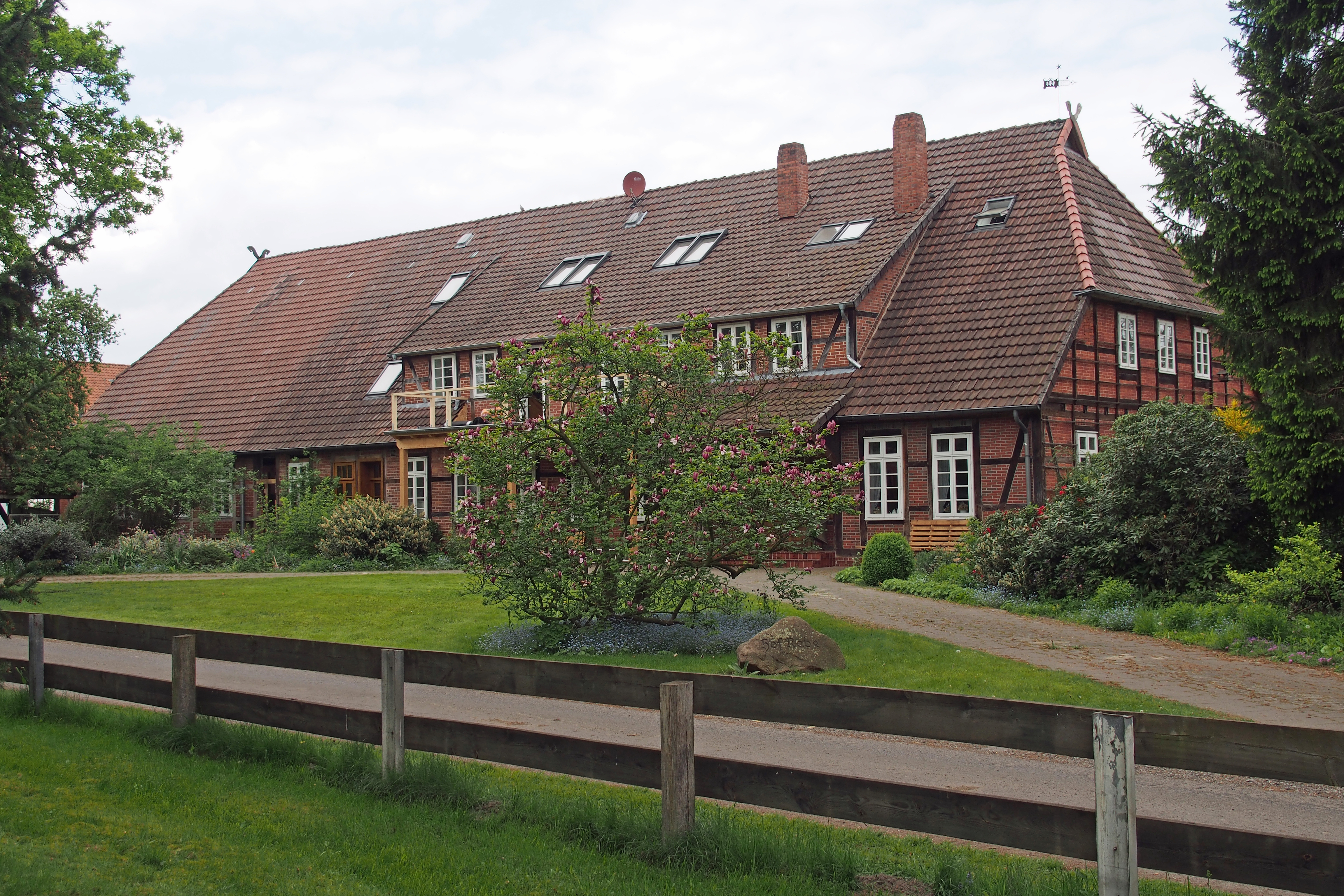 Denkmalgeschützter Bauernhof (Hof Rabe = ehemaliger Lehnshof) in Sülze, Stadt Bergen (Niedersachsen)